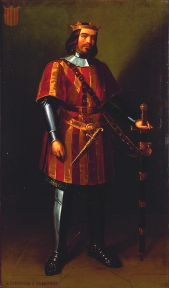 Retrato imaginario del rey Fernando I de Aragón (1380-1416), que fue hijo del rey Juan I de Castilla y de la reina Leonor de Aragón.